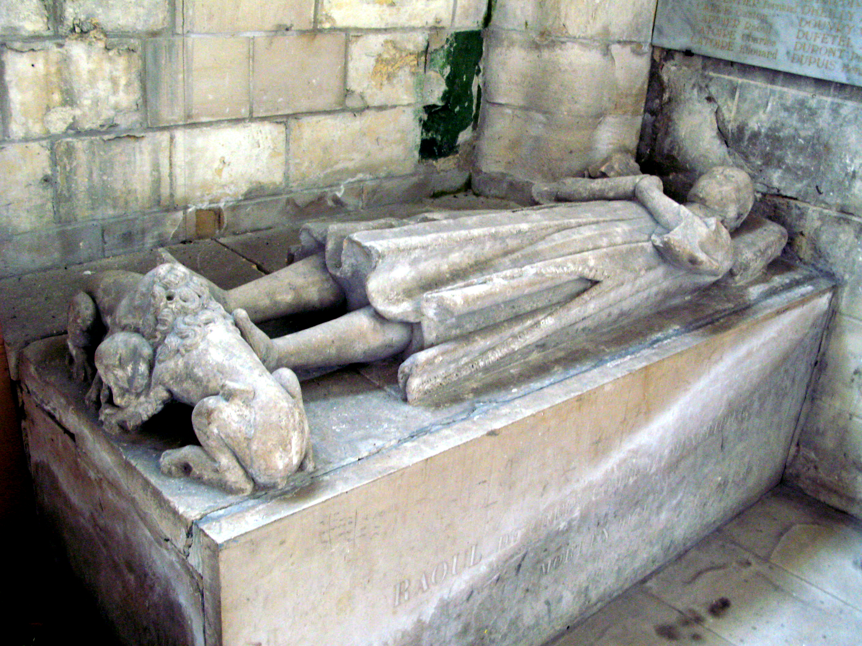 Montdidier (Somme, France) - Le tombeau de Raoul de Crépy, dans l'église Saint-Pierre. . .